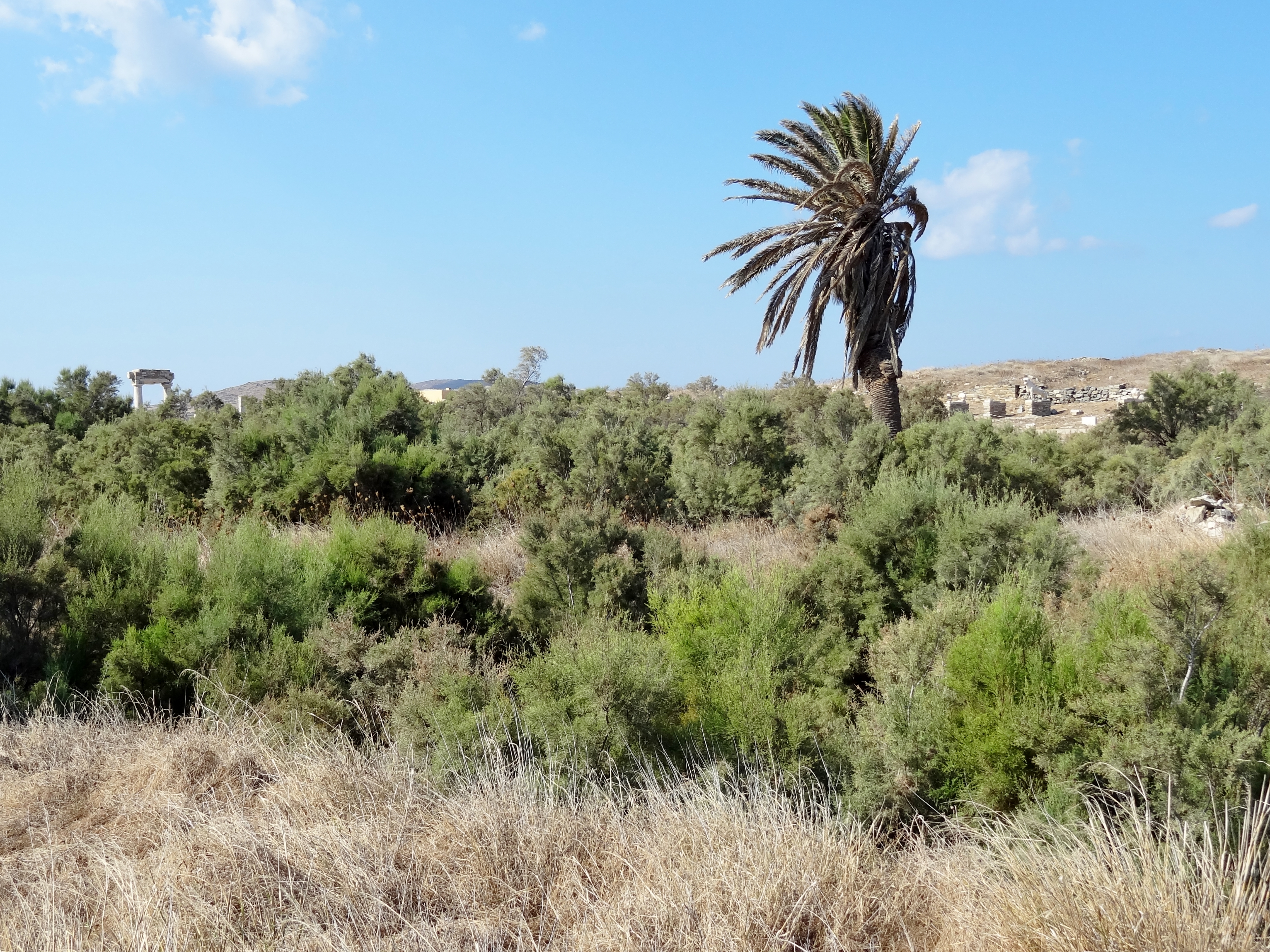 Heiliger See der Ausgrabungsstätte von Delos, Kykladen, Griechenland